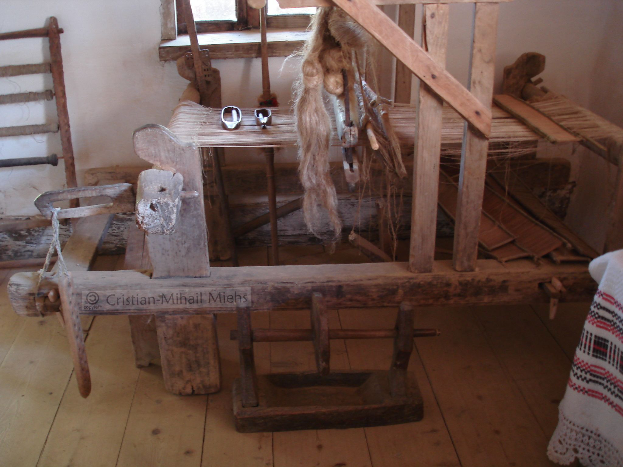 Casa-muzeu Constantin Brâncuşi - interior cu război de ţesut